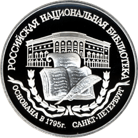 Монета Банка России — Серия: «Памятники архитектуры России», 200-летие основания первой Российской национальной библиотеки, г. Санкт-Петербург, 3 рубля, реверс.